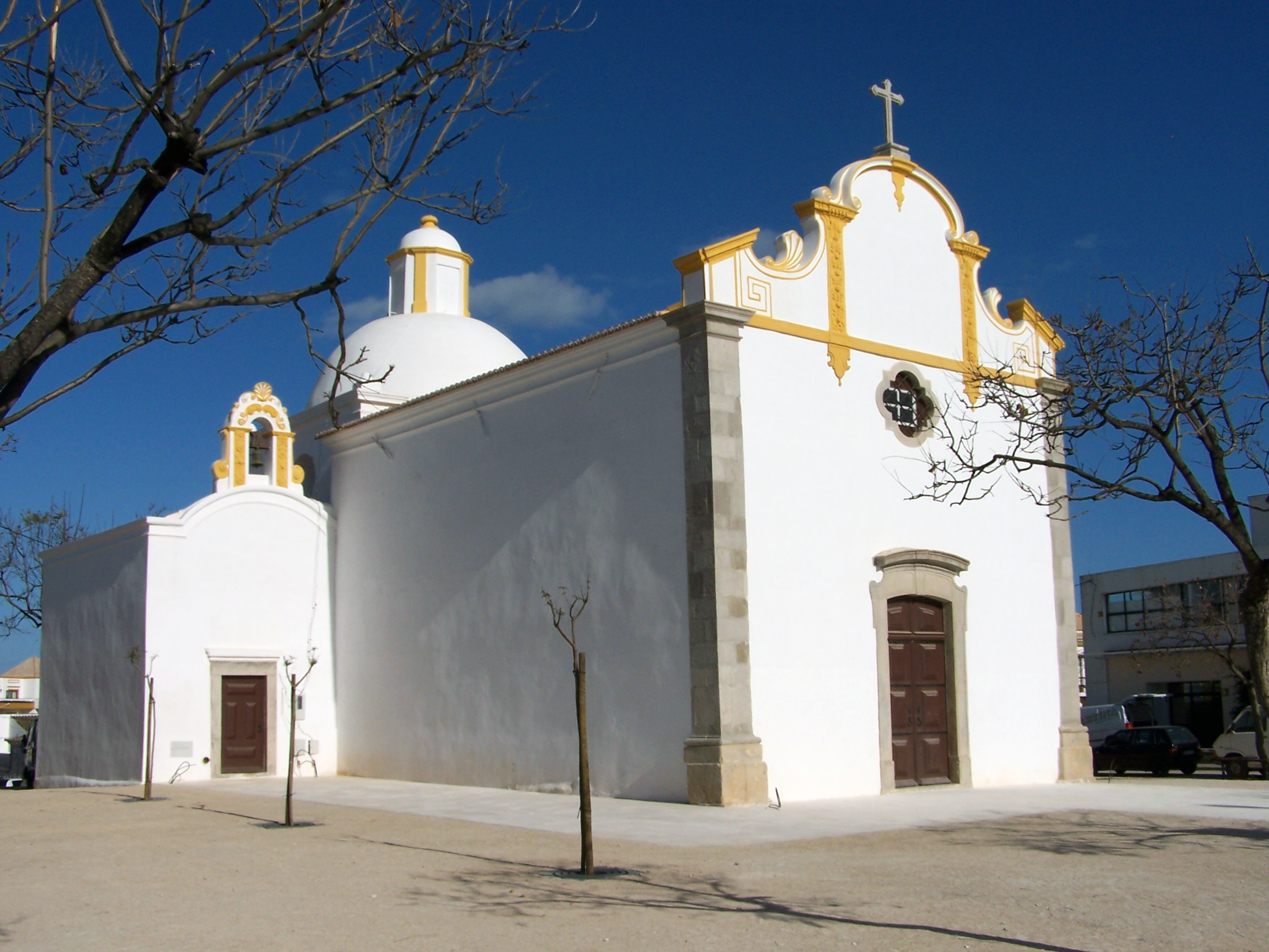 Ermida de São Sebastião de Tavira.